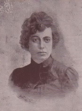 Retrato en sepia de la escritora boliviana Adela Zamudio